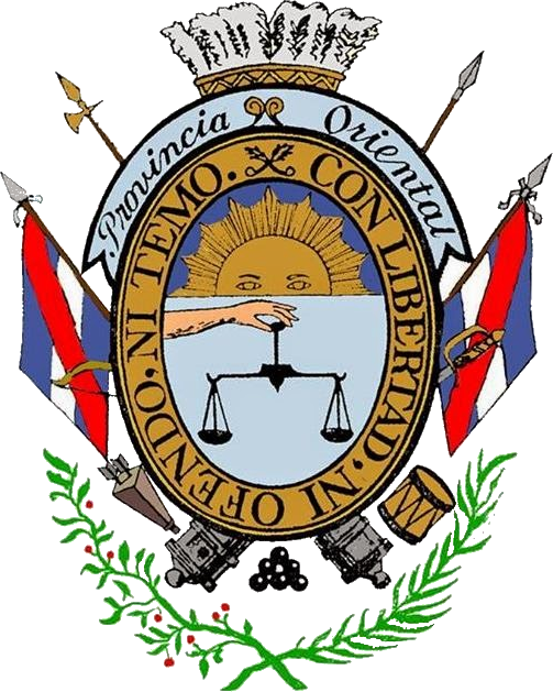 Integrante de las Provincias Unidas del Río de la Plata